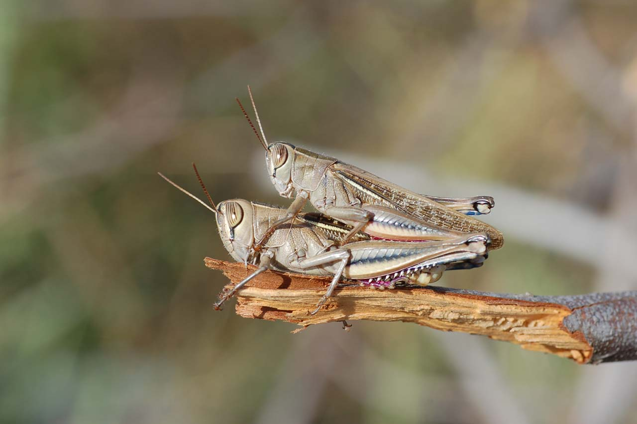 Eyprepocnemis plorans, you can see more images in